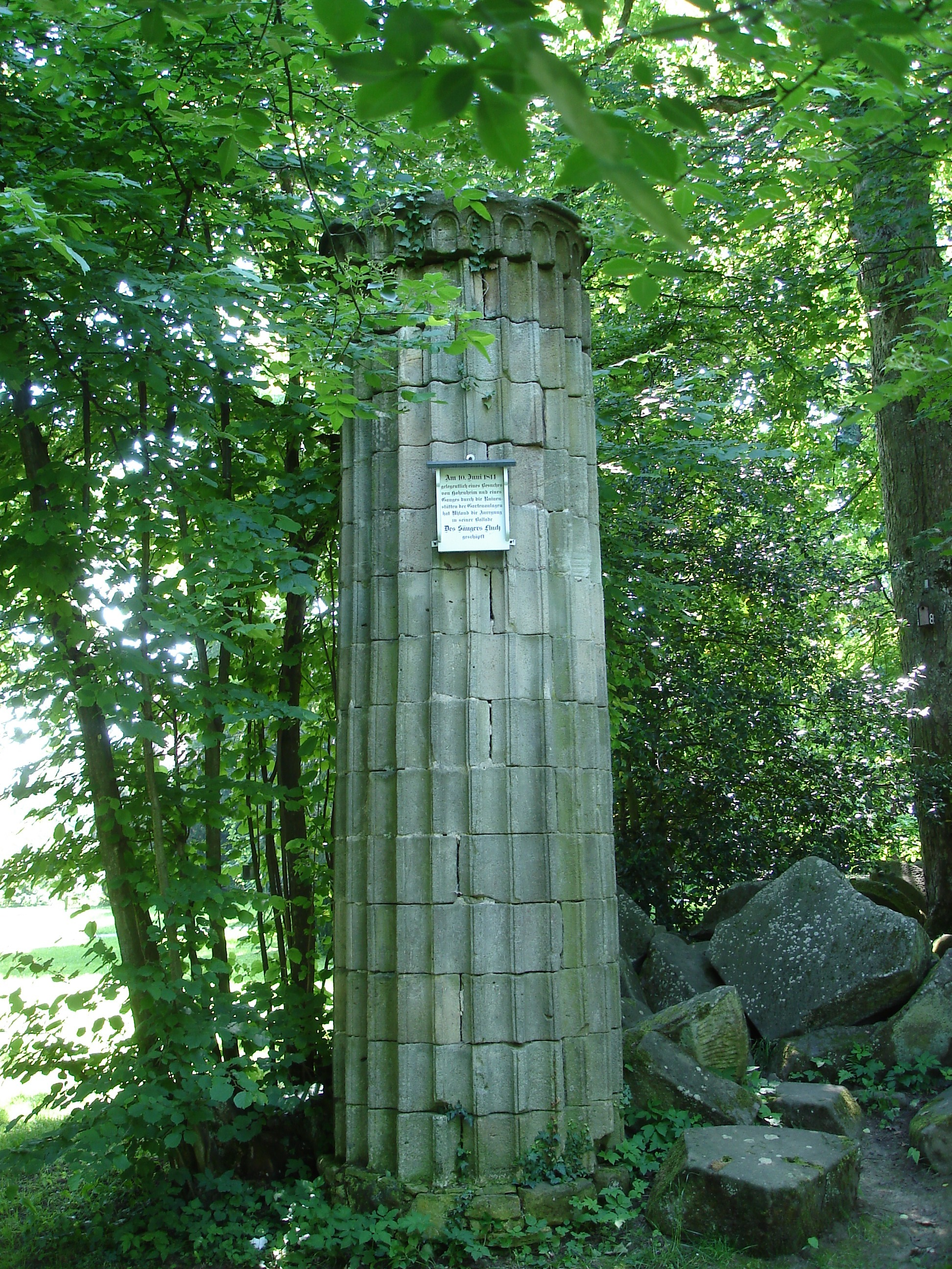 Jupitersäule im Schlosspark Hohenheim. Sie soll Ludwig Uhland zur Ballade Des Sängers Fluch inspiriert haben.